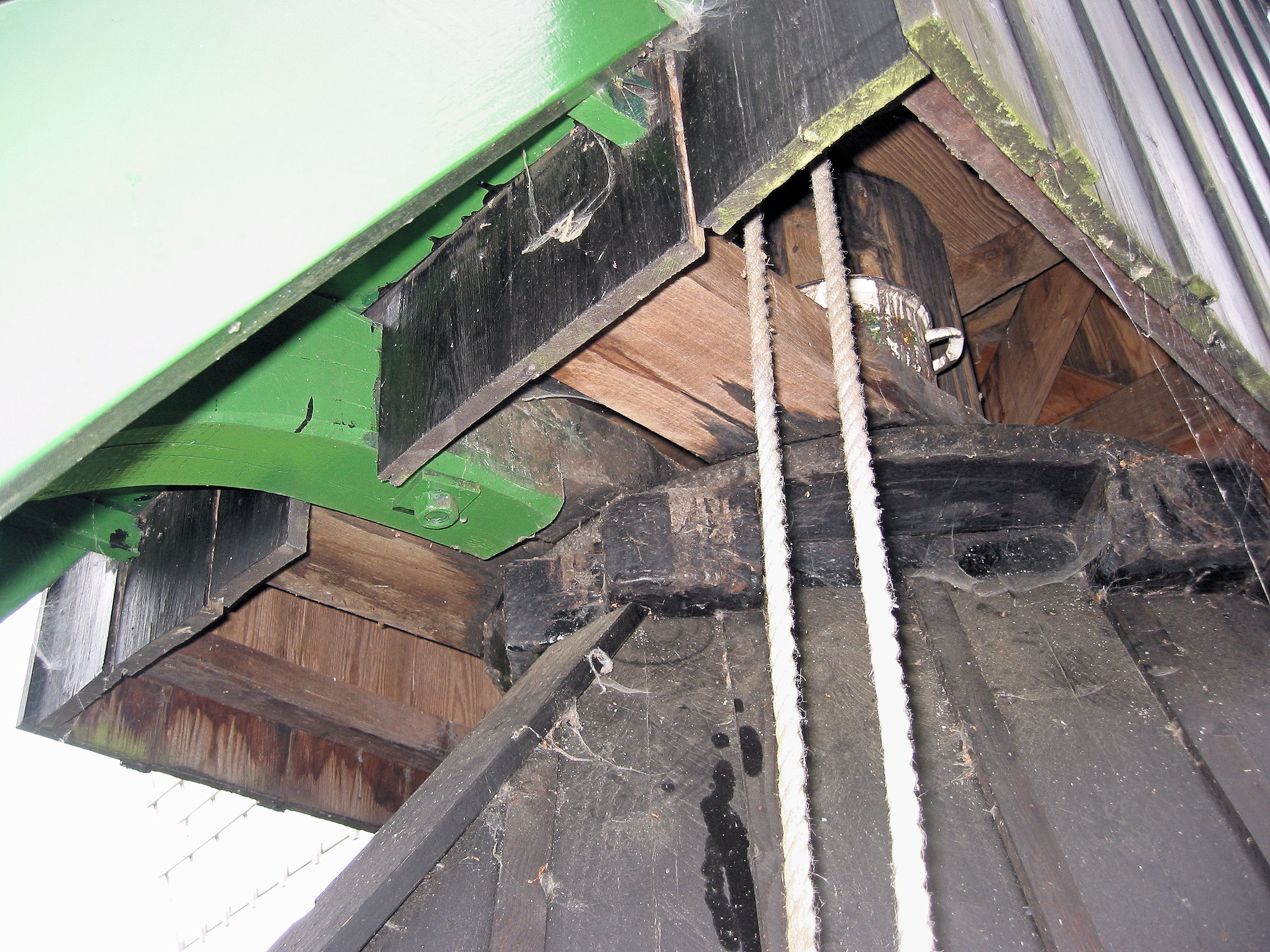 Spinnenkopmolen boventafelement met zetelplaat